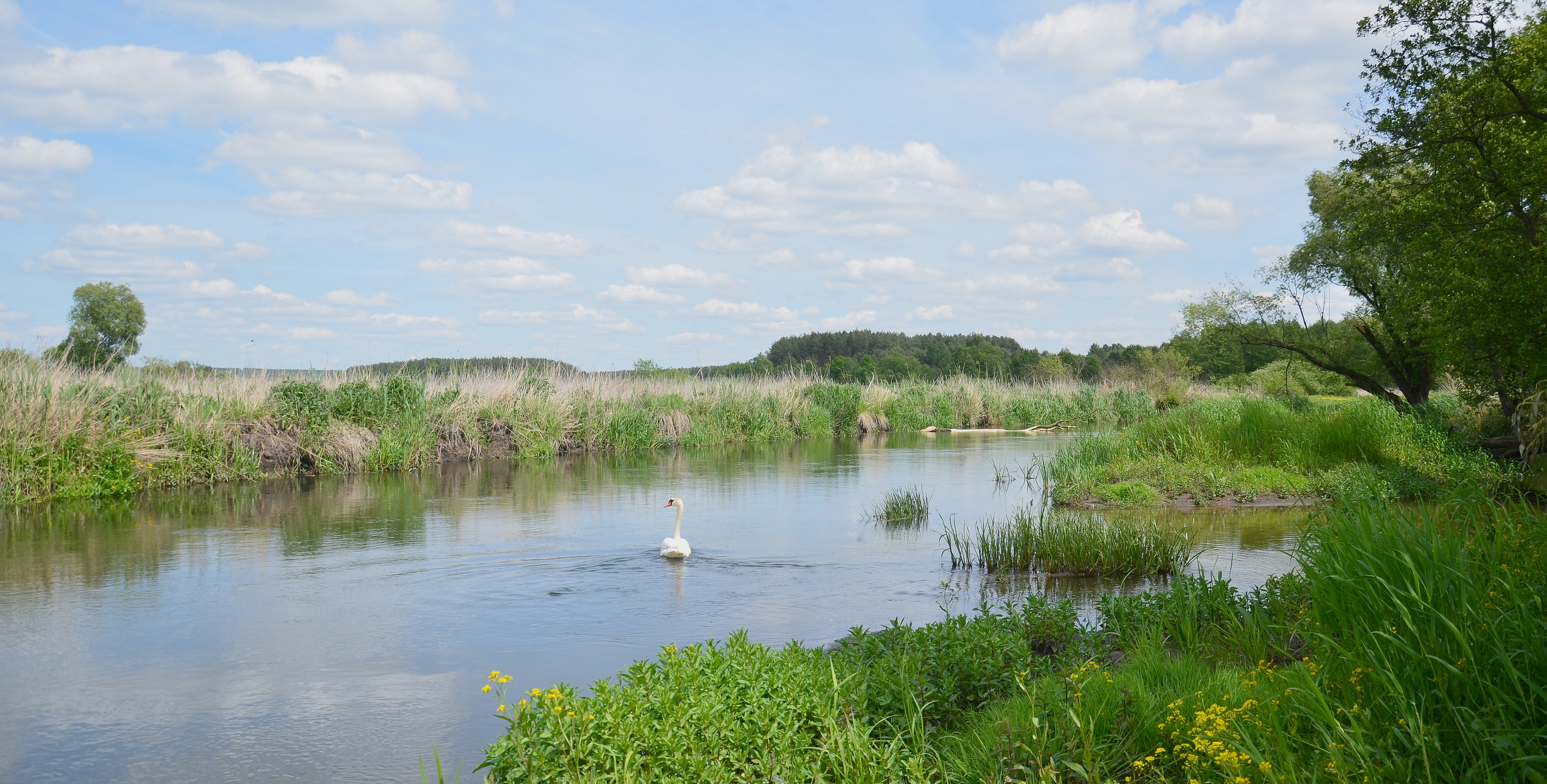 Obszar specjalnej ochrony ptaków Bagienna Dolina Drwęcy. This is a photography of Natura 2000 protected area with ID PLB040002